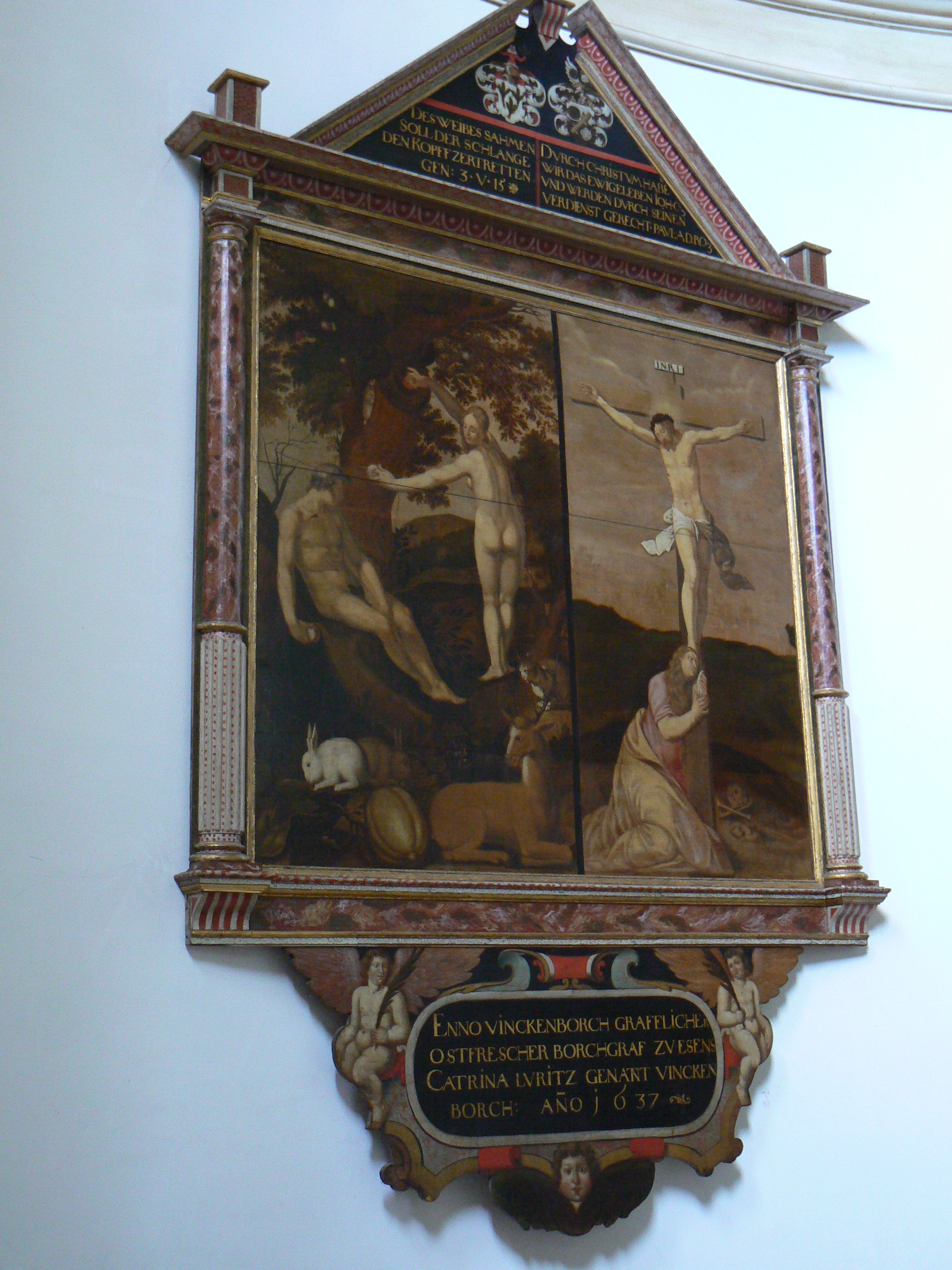 Gemälde im Chorraum St.-Magnus-Kirche in Esens/Germany (1637)